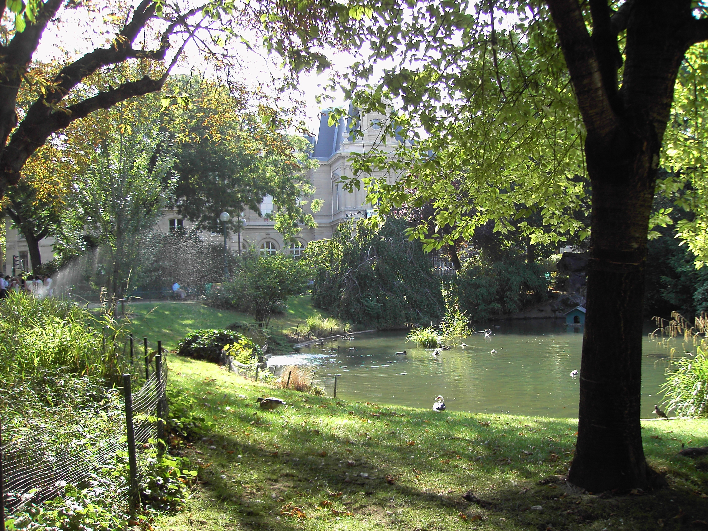 Paris, Square du Temple et Mairie du 3me